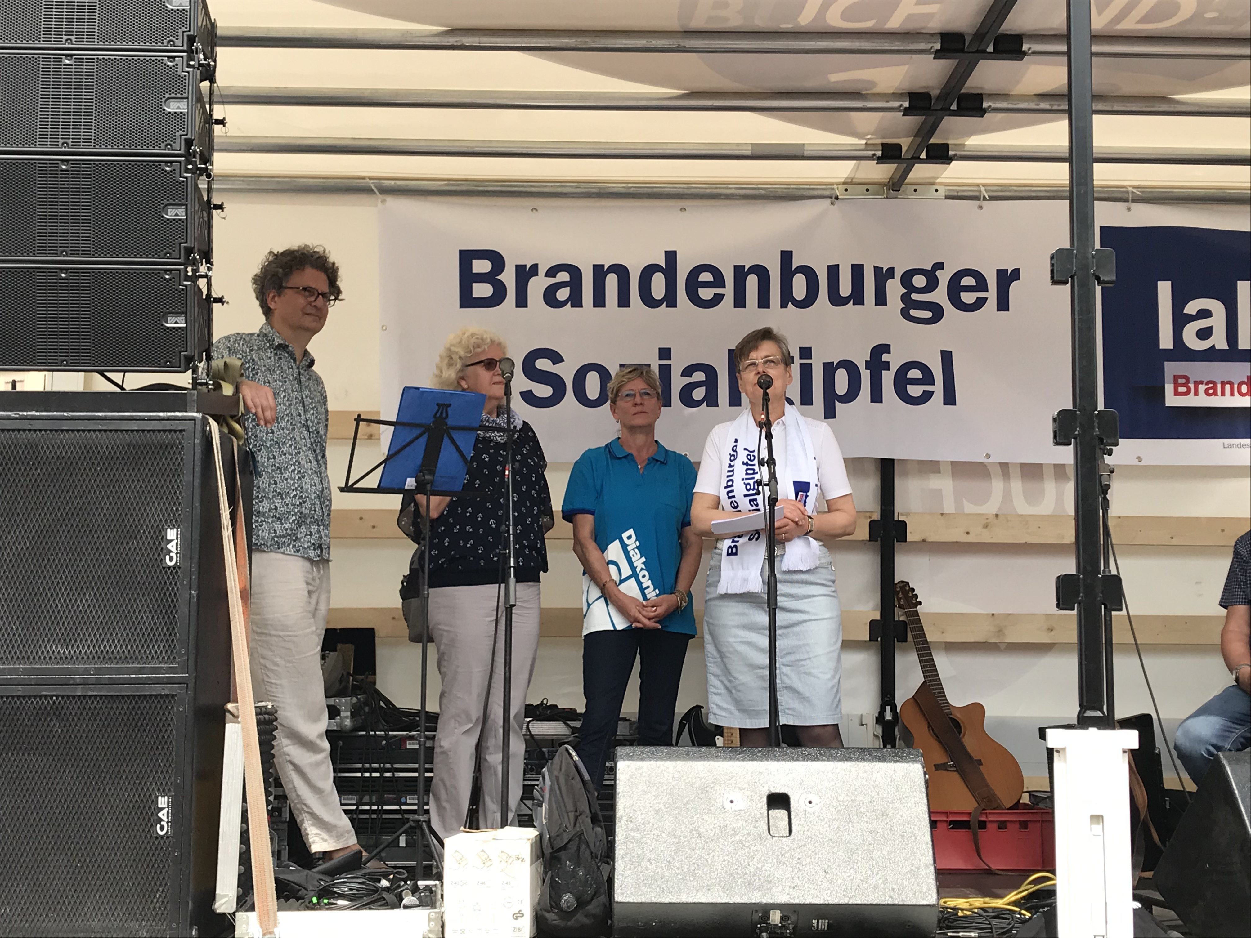 Barbara Eschen spricht auf dem 11. Brandenburger Sozialgipfel in Potsdam